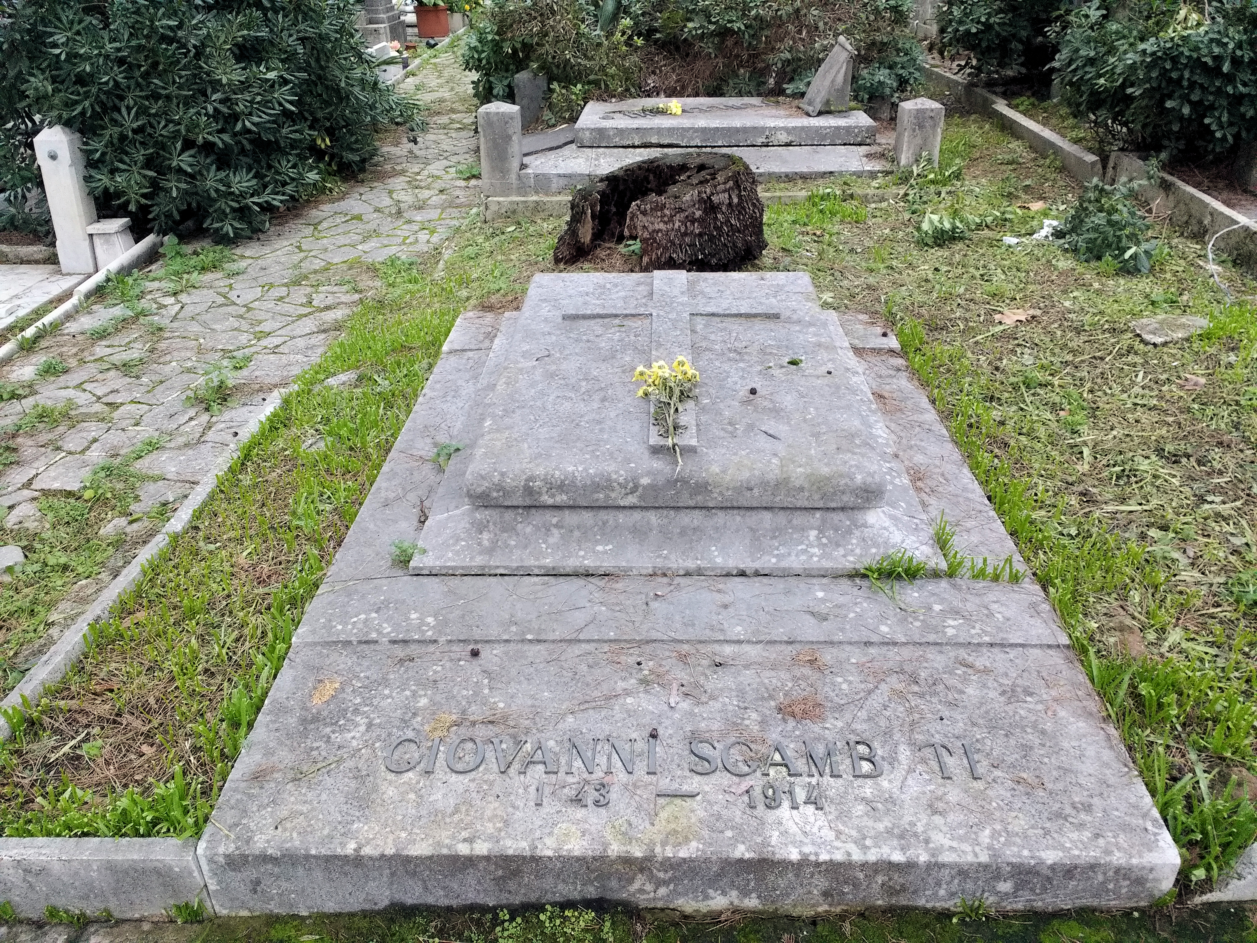 Tomba di Giovanni Sgambati presso il Cimitero del Verano di Roma (area IX "Bassopiano Pincetto", settore 140).